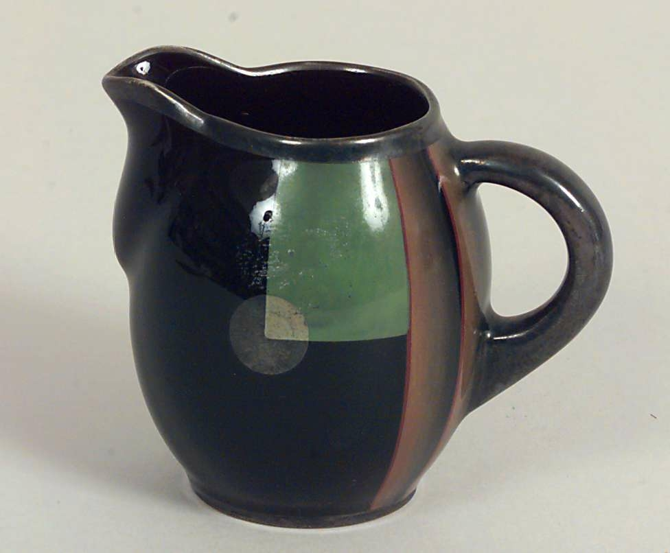 Fløtemugge fra 1928, design av Nora Guldbrandsen, laget på Porsgrunds porselænsfabrik A/S. Foto Anne-Lise Reinsfelt, Norsk Folkemuseum, NF.1982-1065.